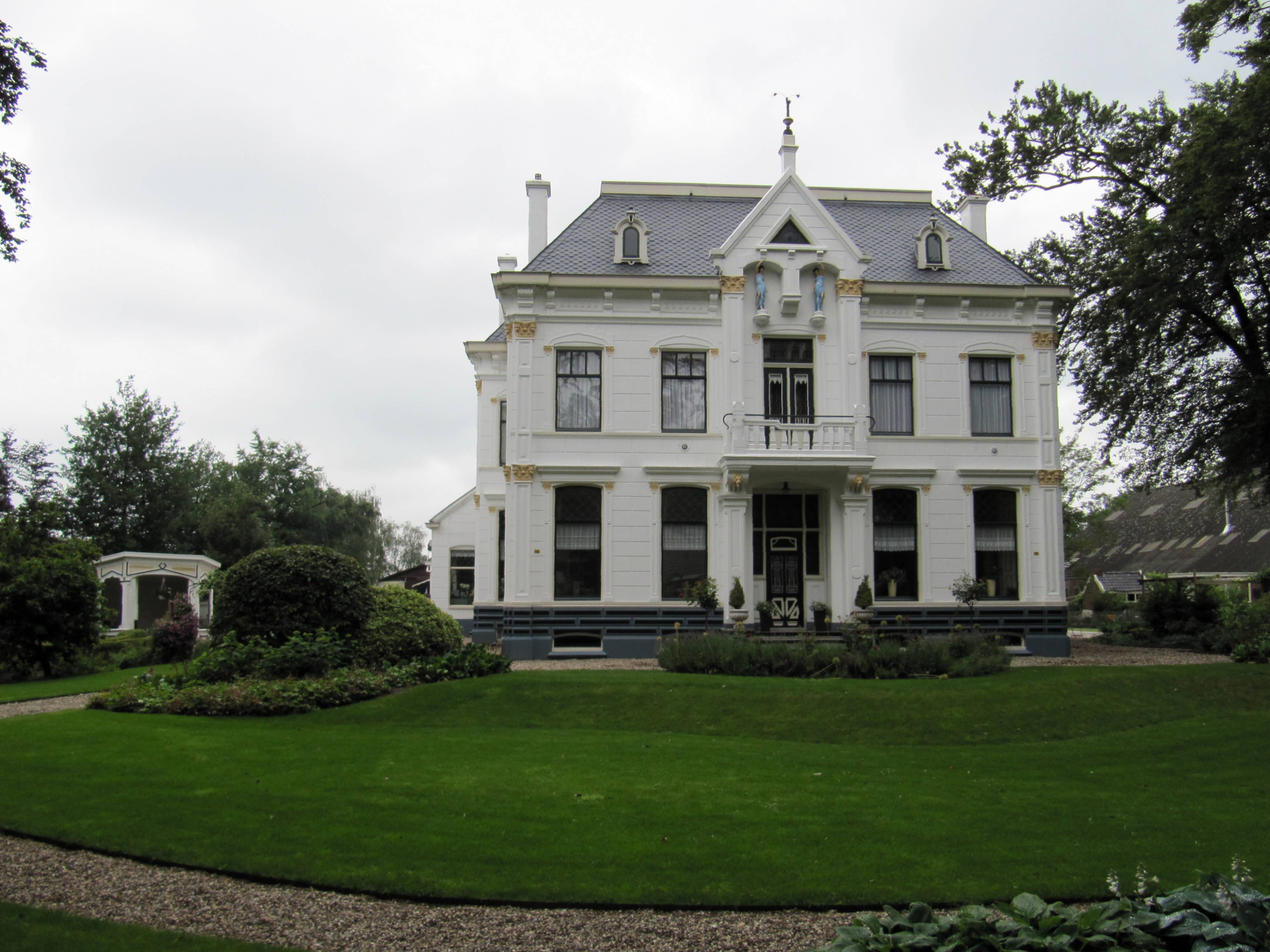 Villaboerderij, gebouwd in 1906 in een Eclectische stijl met Neo-Classicistische en Art Nouveau elementen. In de top een driehoekig venster waaronder twee beelden van de godin Ceres (godin van de landbouw).